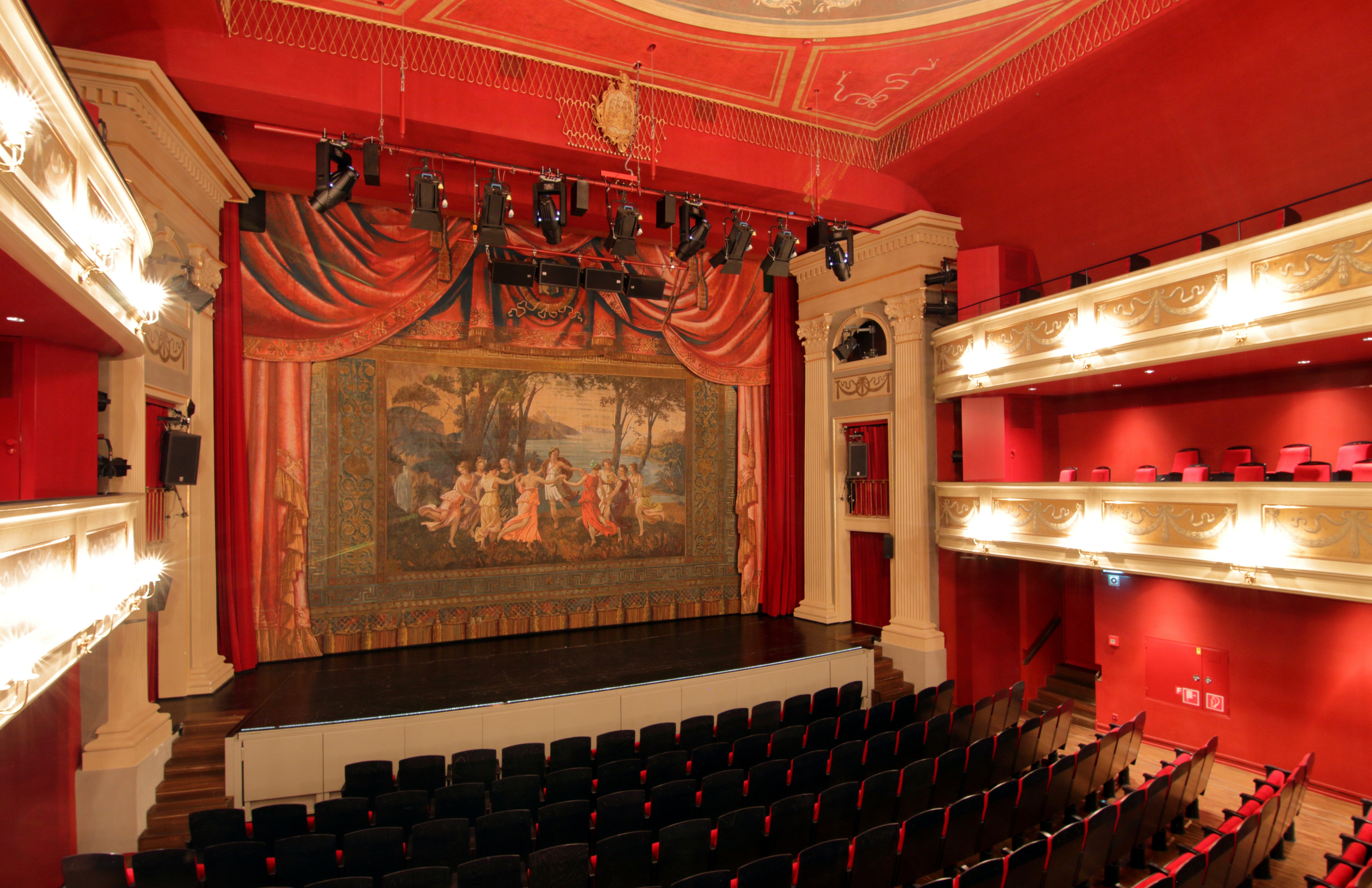 Historischer Vorhang des Stadttheaters Kempten